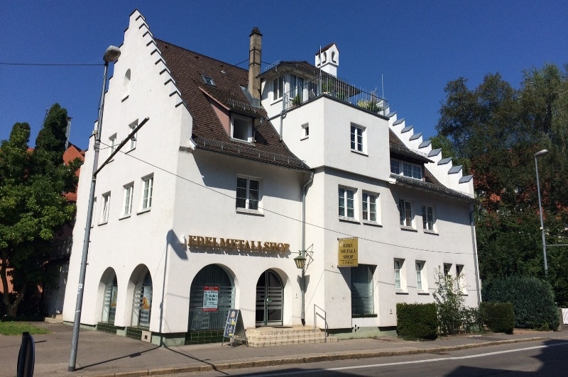 Filiale von valvero in Lindau